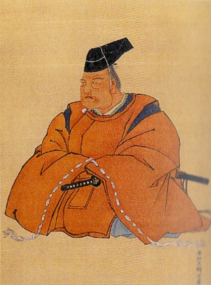 肥後佐賀藩藩儒・古賀精里の肖像画。